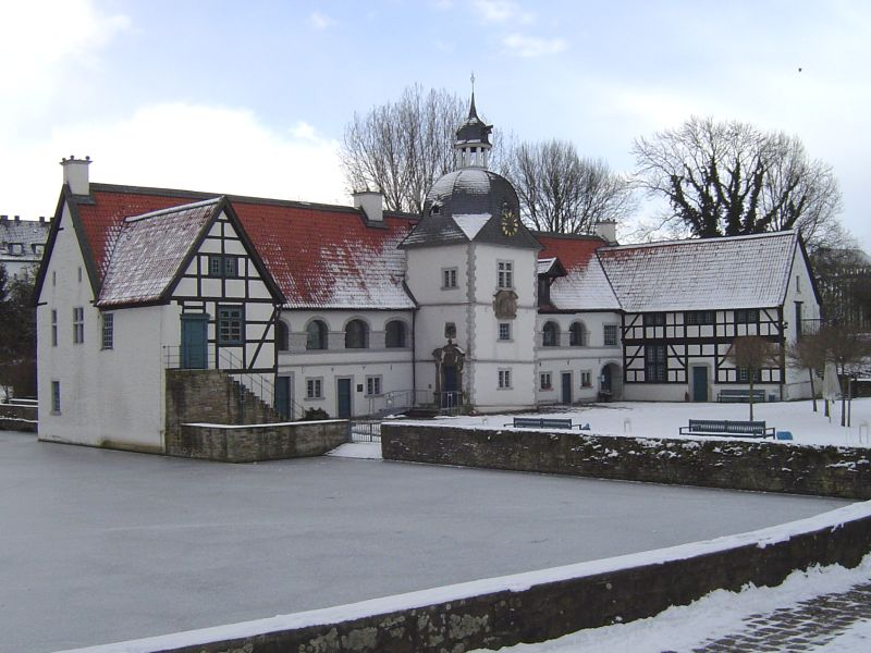 Haus Rodenberg in Dortmund-Aplerbeck